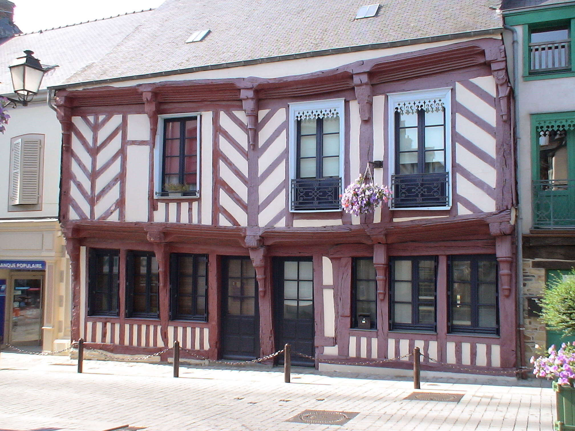 Maison en colombage (Le Chêne vert) au 20, rue de la Madeleine à Châteaugiron.